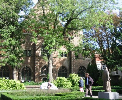 Delft, het Prinsenhof met standbeeld van Willem de Zwijger in de tuin met buxushaag en een bank van resten van Delfts blauwe tegels, eigen foto